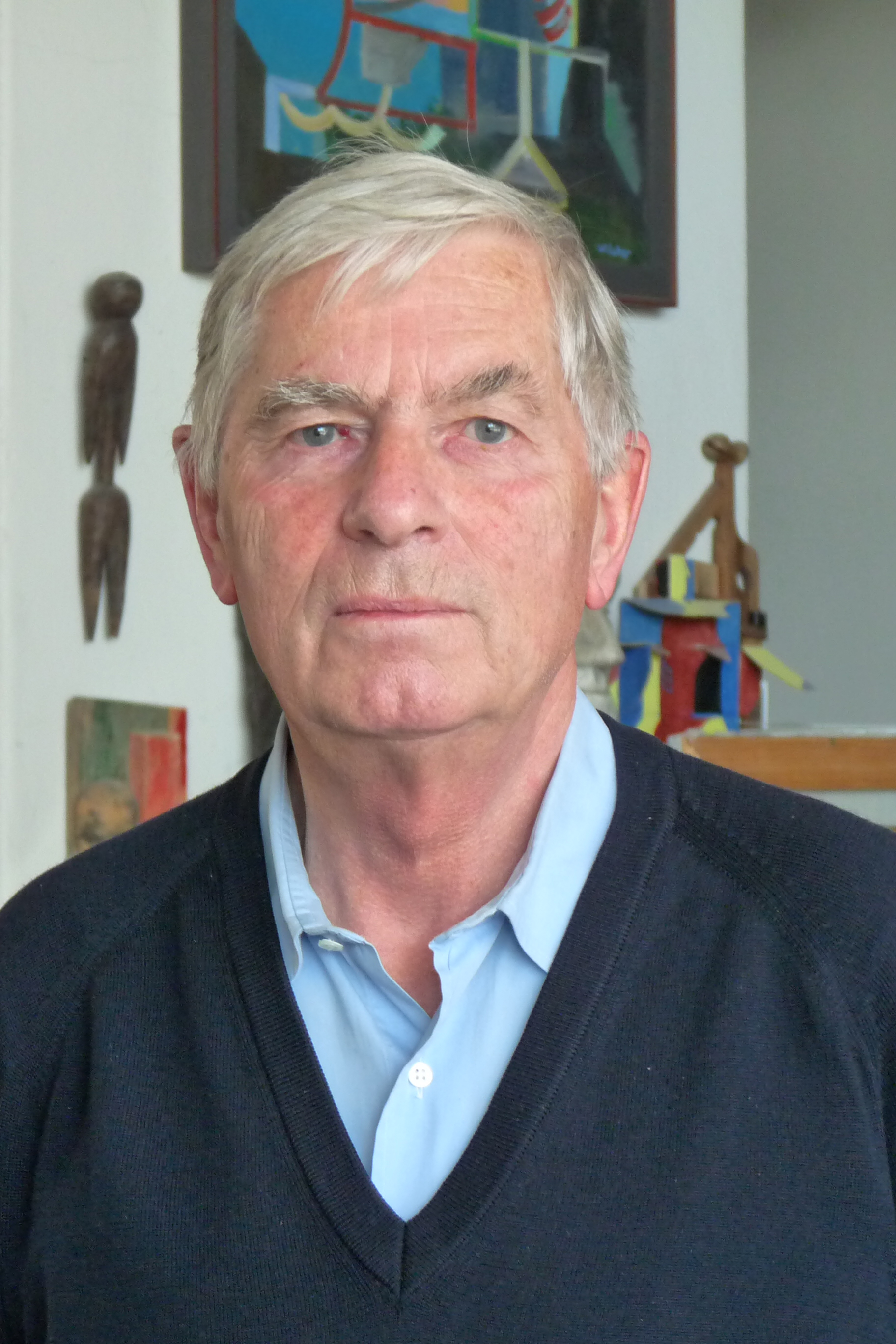 Wolfgang Leber im Atelier, 2012 (Foto: Lutz Wohlrab)